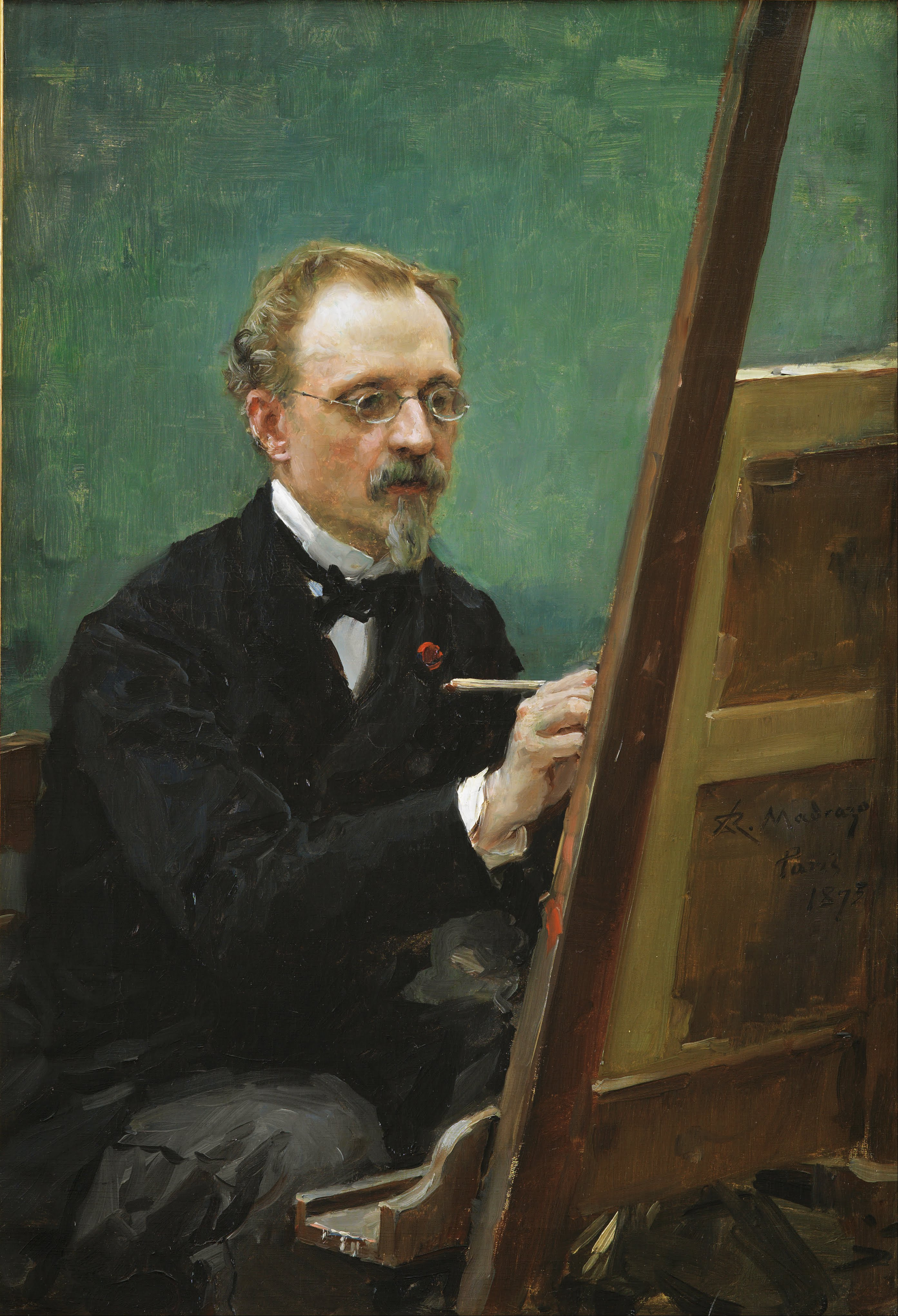 El lienzo representa al pintor español Federico de Madrazo y Kuntz (1815-1894) trabajando en un cuadro.